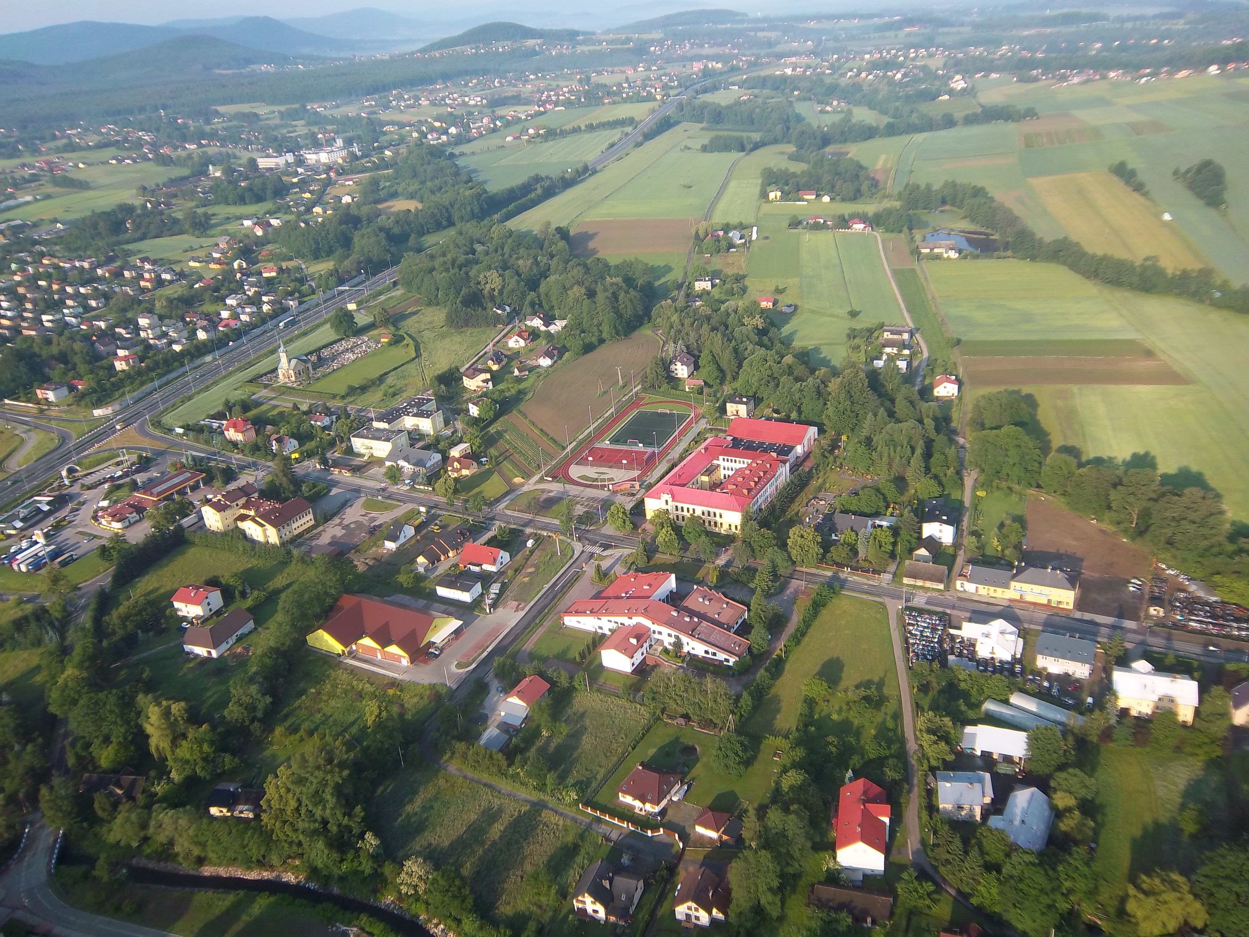 Centrum Jasienicy widziany z powietrza.